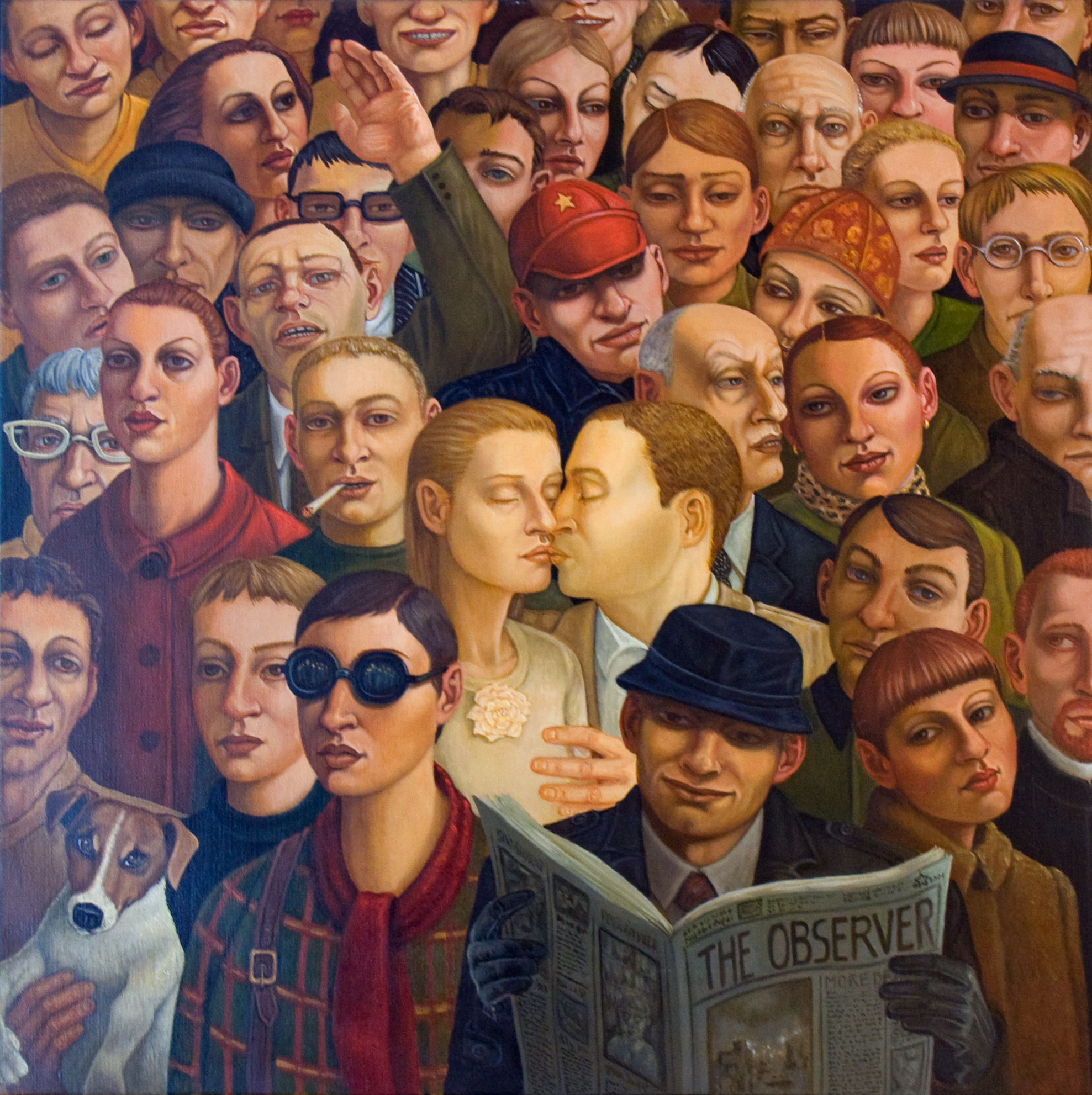 De Kus